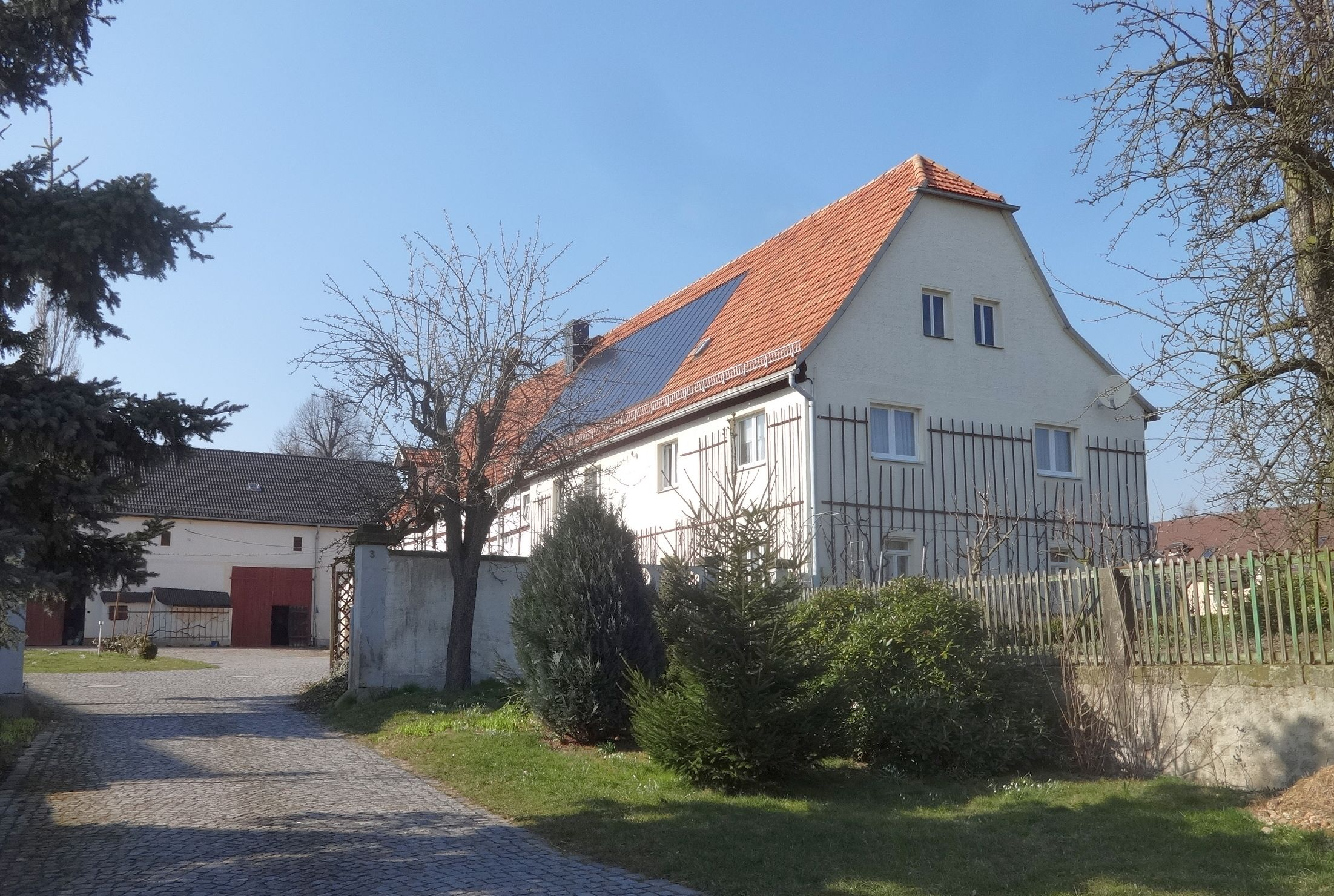 Zum Lindenhof 3 (denkmalgeschützt) in Riemsdorf, eimem Ortsteil der Ortschaft Scharfenberg in der Gemeinde Klipphausen im Landkreis Meißen, Sachsen.